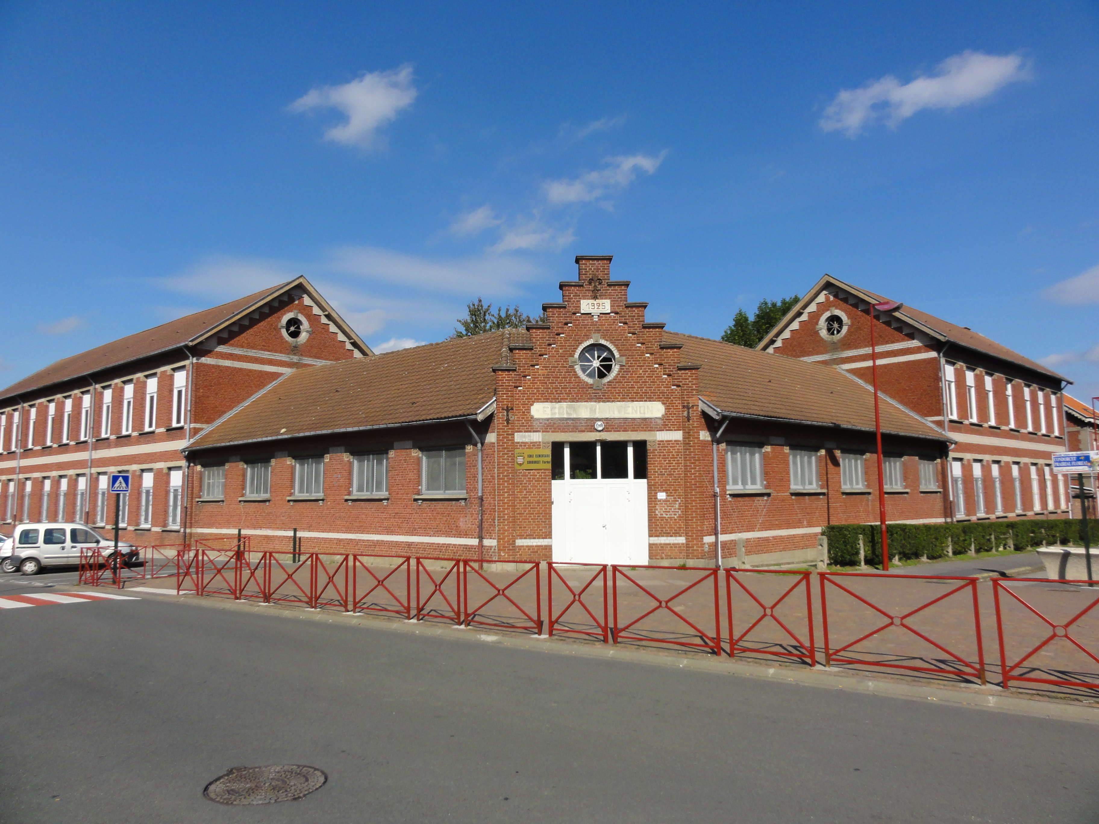 Écoles des cités de la fosse n° 3 - 3 bis - 3 ter de la Compagnie des mines de Liévin dans le bassin minier du Nord-Pas-de-Calais, Liévin, Pas-de-Calais, Nord-Pas-de-Calais, France.